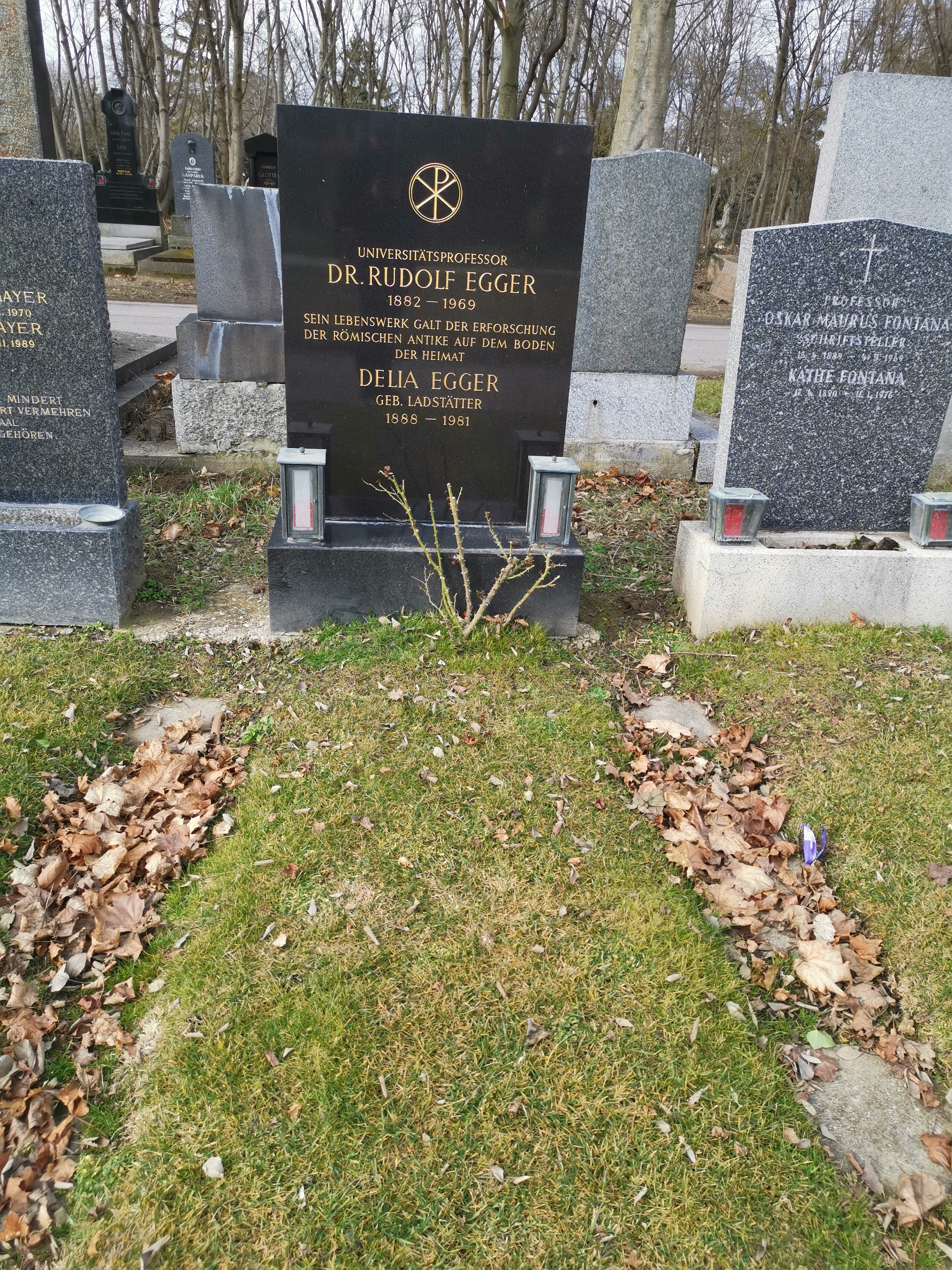 Grab von Rudolf Egger auf dem Wiener Zentralfriedhof